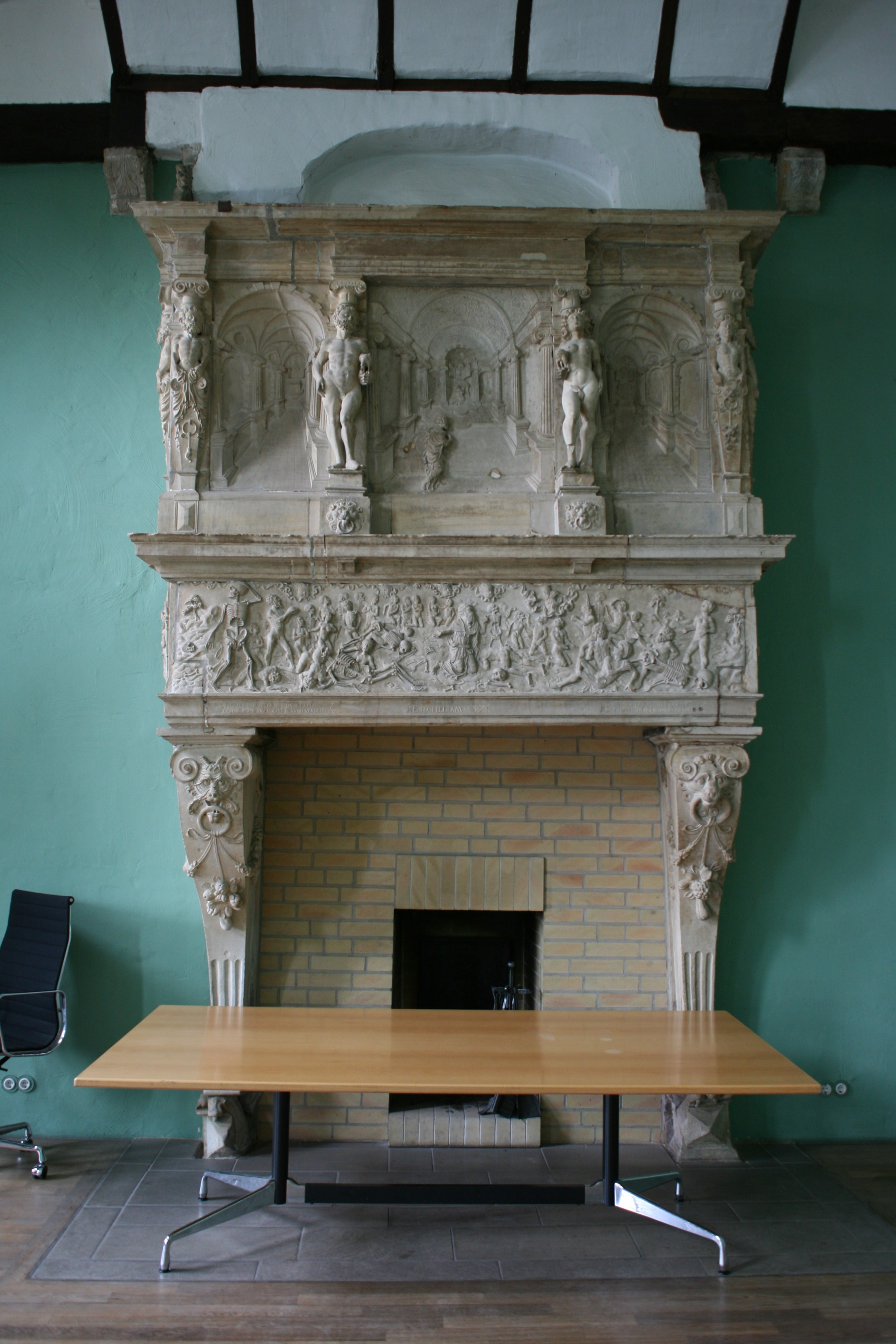 Der Auferstehungskamin (ehemaliger Küchenkamin) von Schloss Horst in Gelsenkirchen-Horst